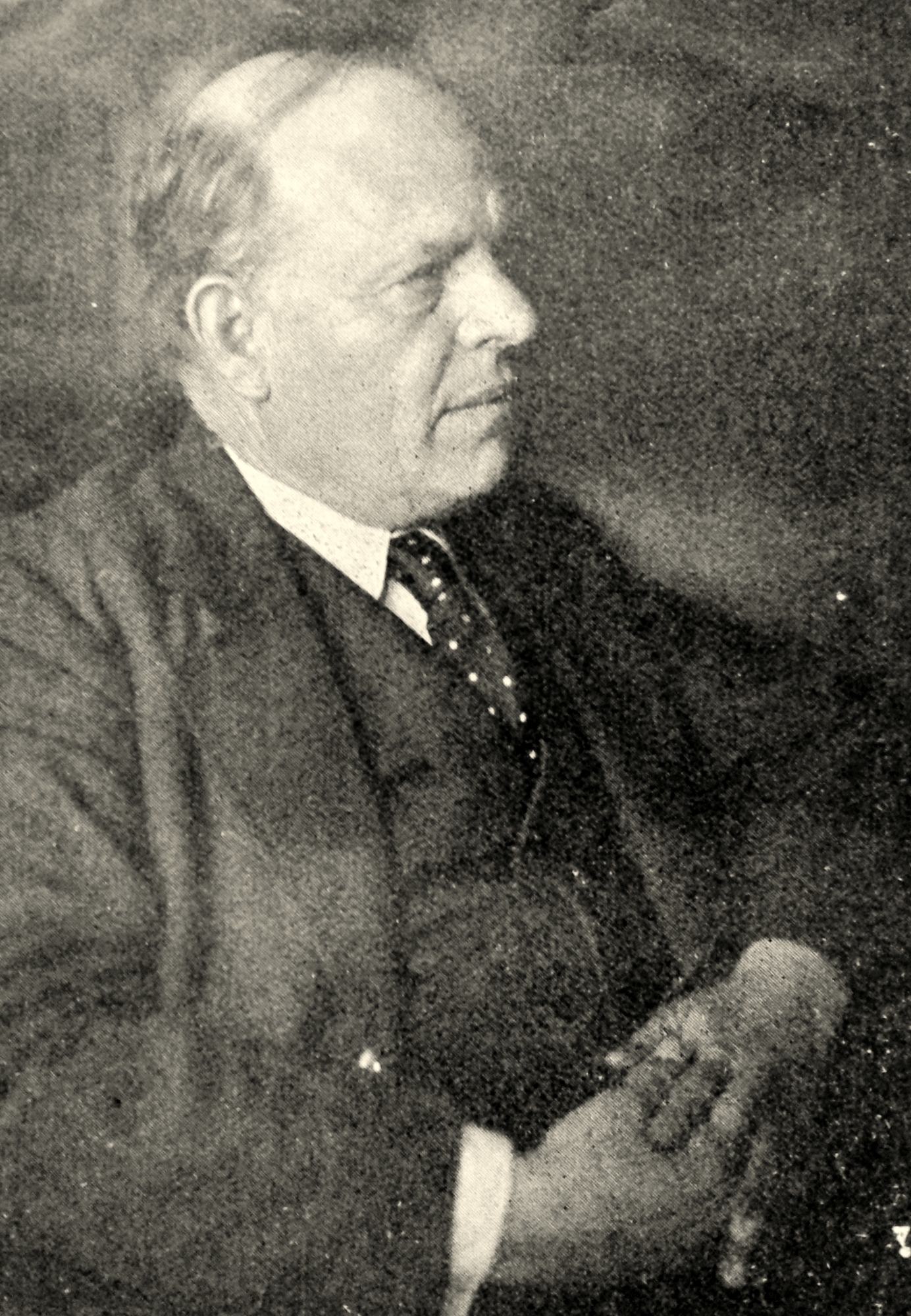 המשורר חיים נחמן ביאליק